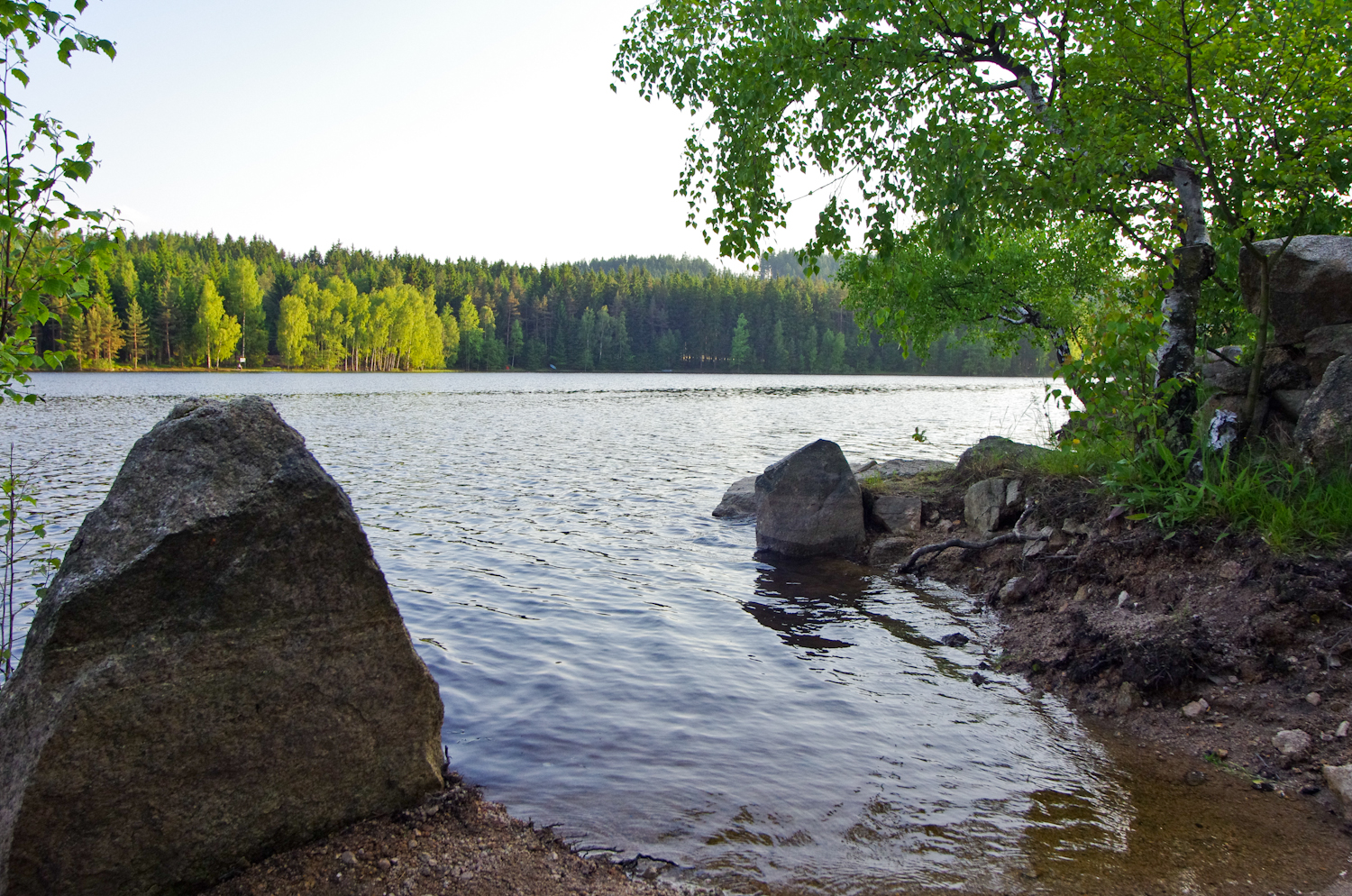 Tatrovice, Krušné hory, přehradní jezero